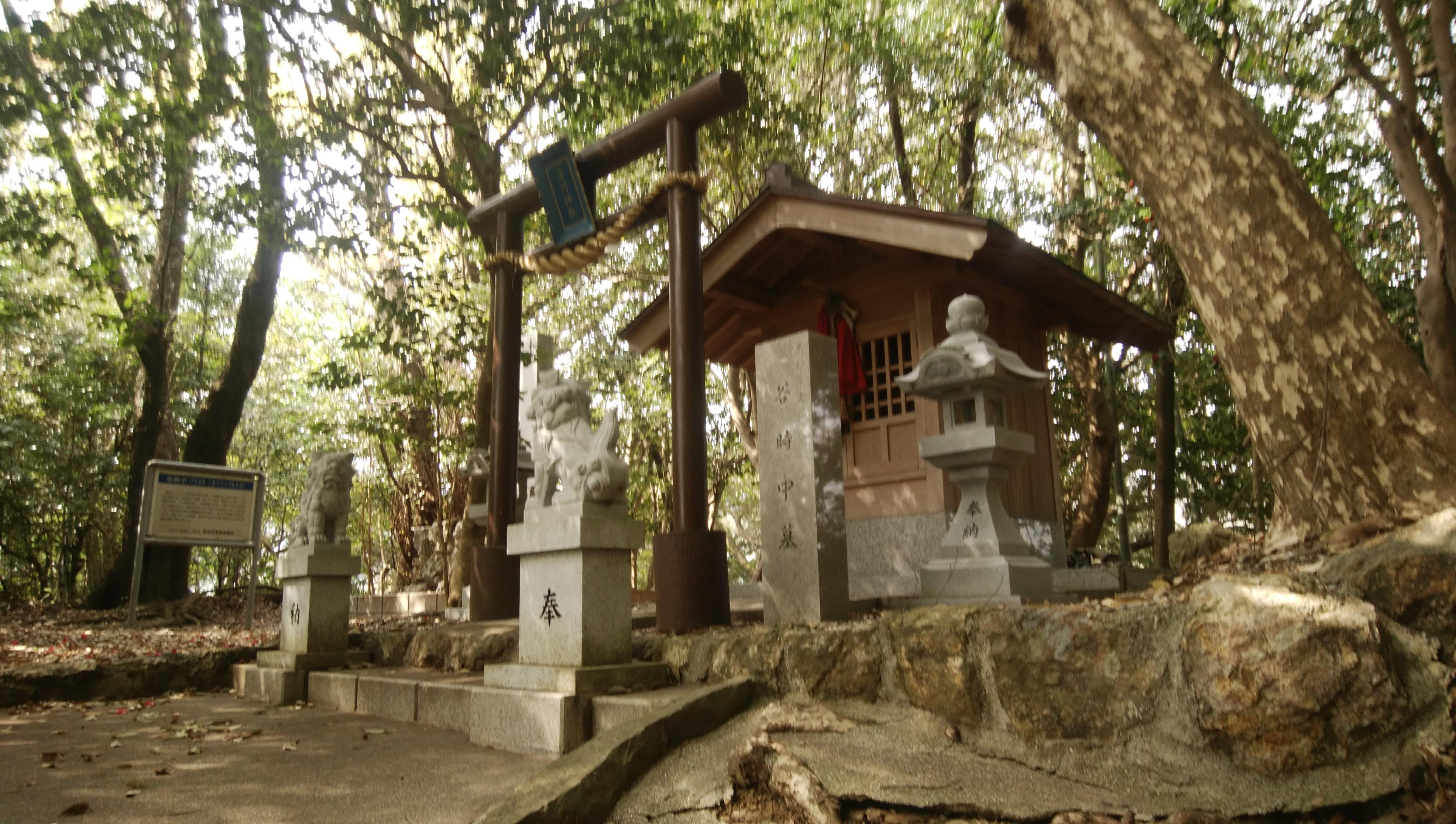 谷寺中が祀られる神社を映したもの。